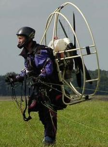 Startbereiter Motorschirmpilot mit Rucksackmotor: Pilot in Gurtzeug mit Rettungsschirm, Steuerleinen in der Hand; Rucksackmotor mit Propeller, Tank und Schutzkäfig; Fangleinen laufen zu am Boden ausgelegtem Gleitschirm außerhalb des Bildes